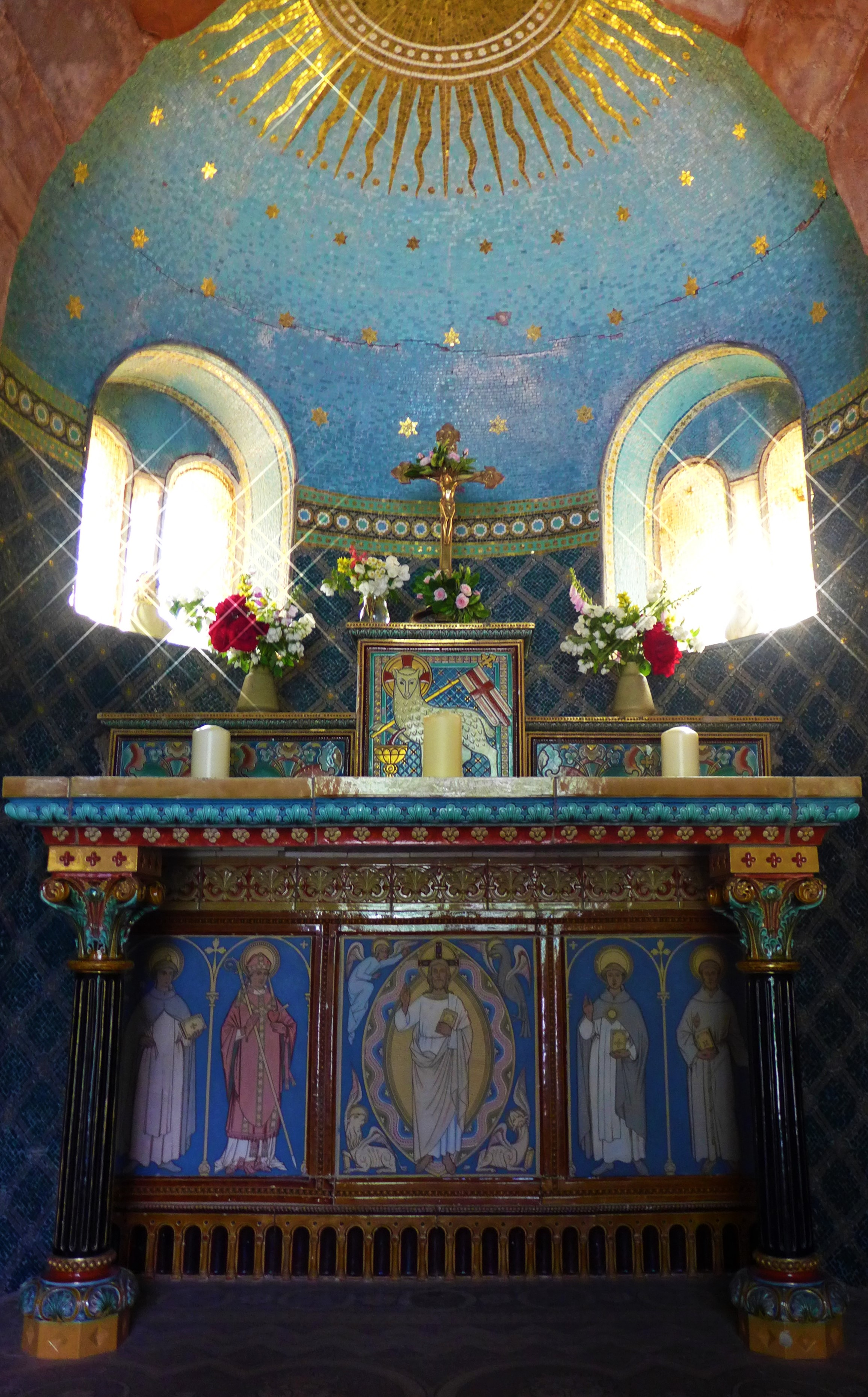 Lutwinuskapelle (Mettlach), Altar